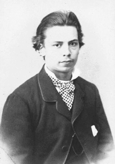 Philipp Mainländer, circa 1867.